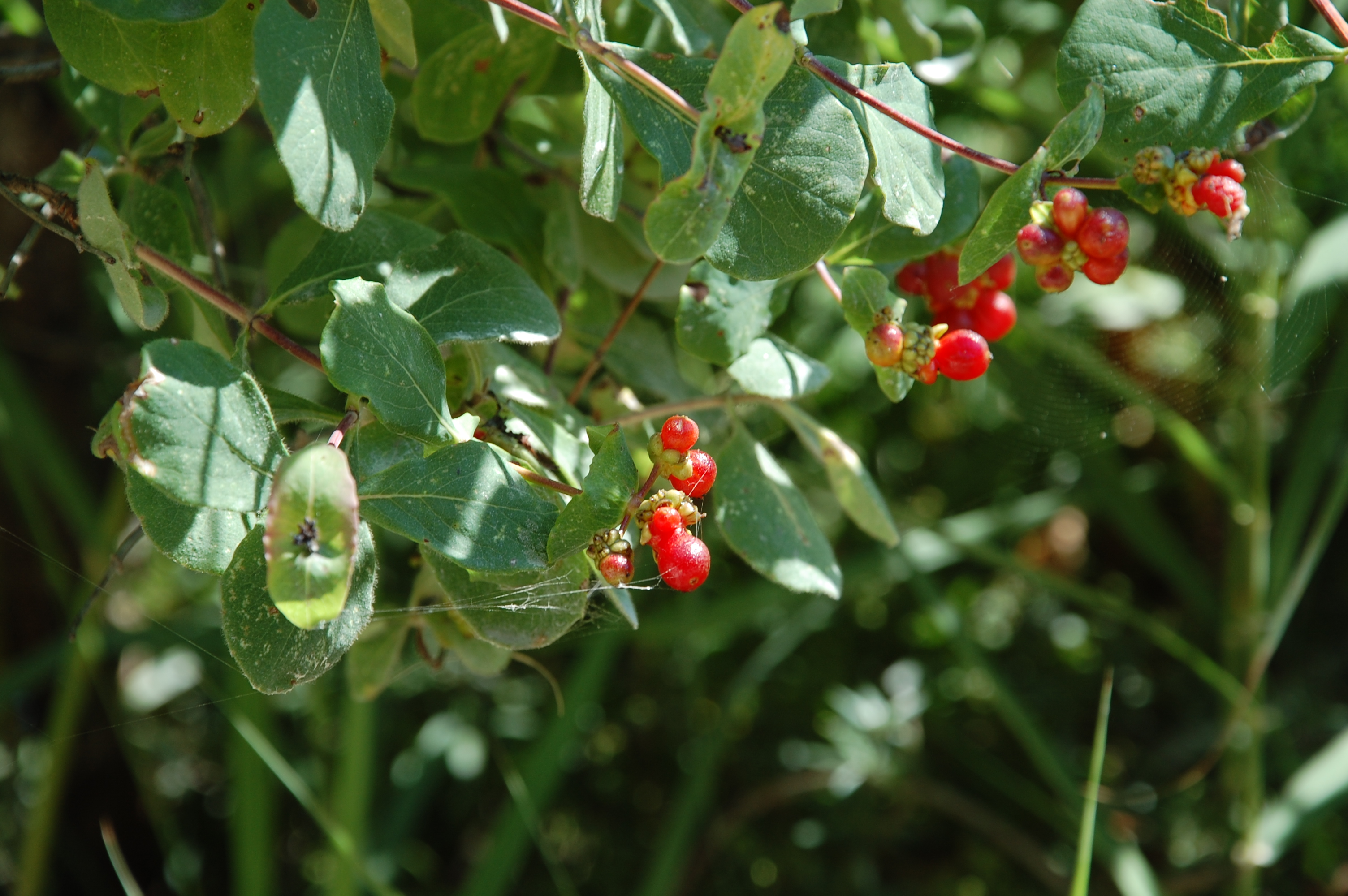 Lonicera etrusca Monte Conero, Italy